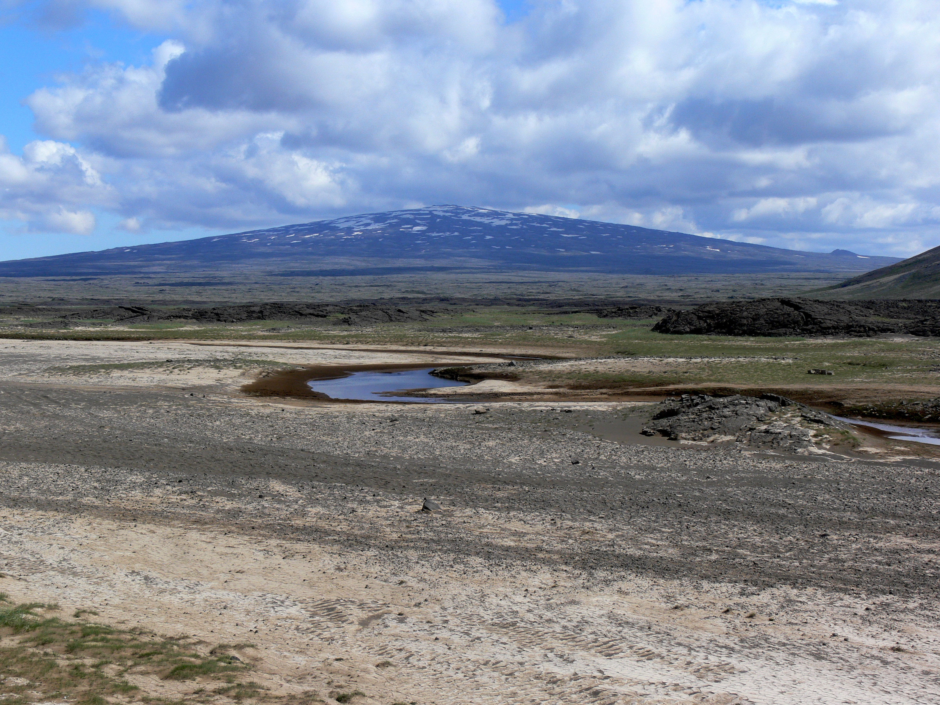 Schildvulkan Skjaldbreiður.